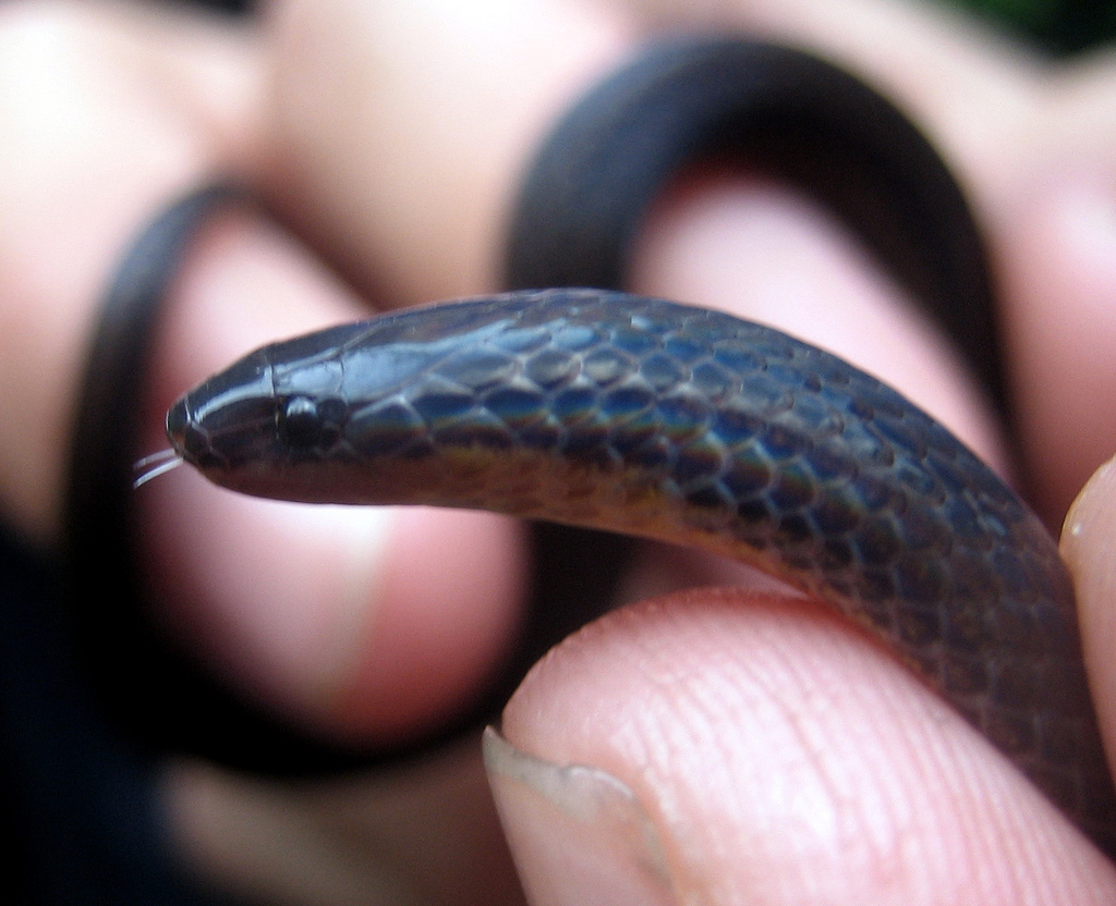 Jan's Earth Snake, Adelphicos quadrivirgatus quadrivirgatus (a subspecies of the Middle American Burrowing Snake). 1 Oct 2006. Estación Biológica Los Tuxtlas, Sierra de los Tuxtlas, VER.